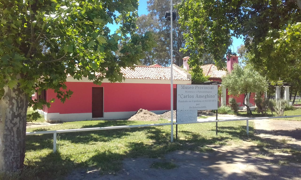 Imagen del Museo Carlos Ameghino desde el exterior.